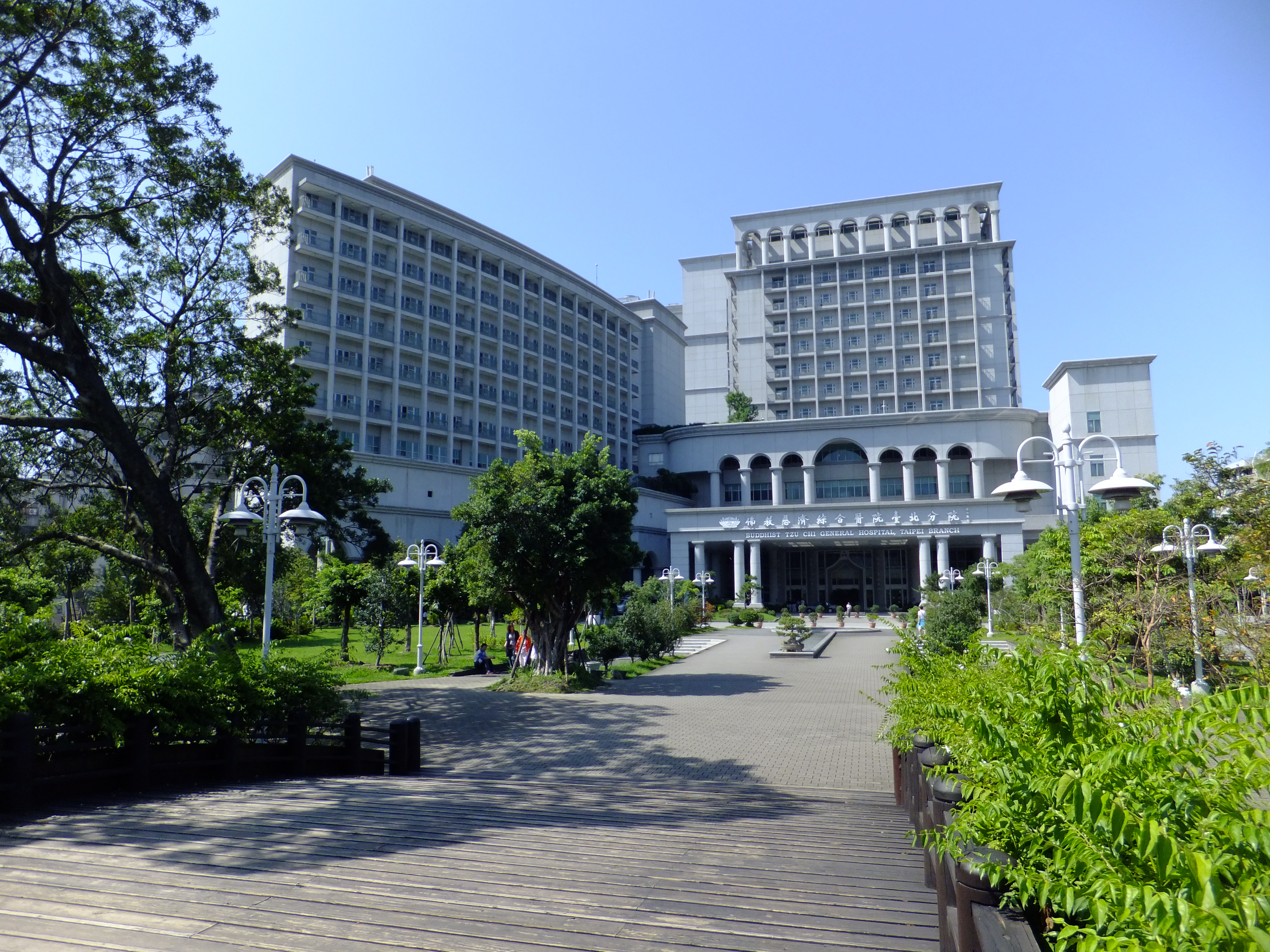 佛教慈濟綜合醫院臺北分院，地址：新北市新店區建國路289號。